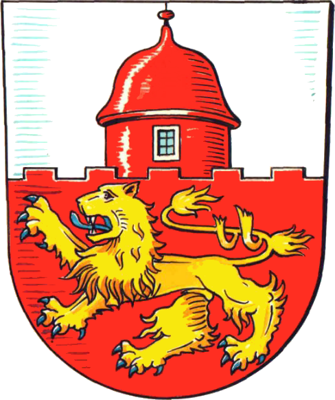 Die damalige Gemeinde, seit dem 14. Oktober 1981 Flecken, Brome erhielt am 22. November 1963 die Genehmigung zur Führung des Wappens, die Samtgemeinde Brome am 20. September 1976.